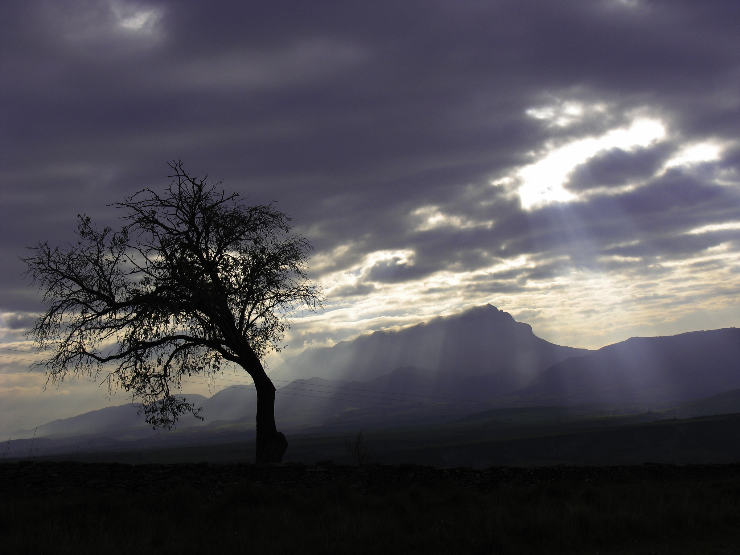 Peña oroel desde el pueblo de Araguas del Solano